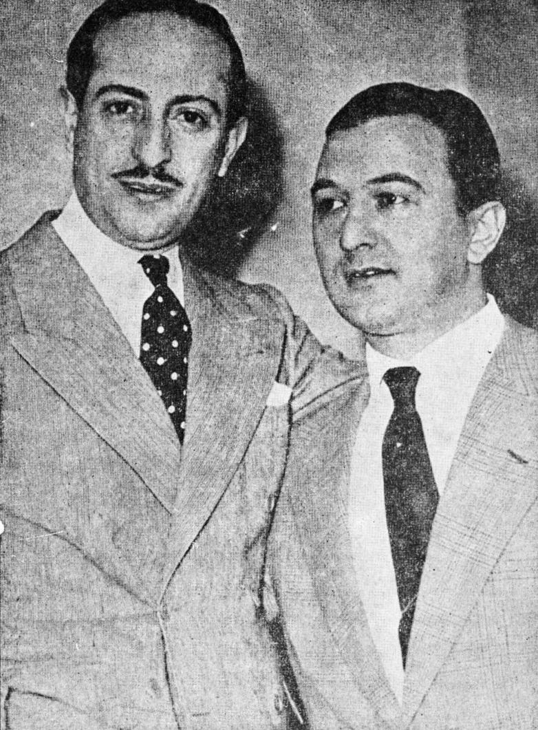 El pianista argentino Ángel D'Agostino junto al cantor Ángel Vargas, década de 1940